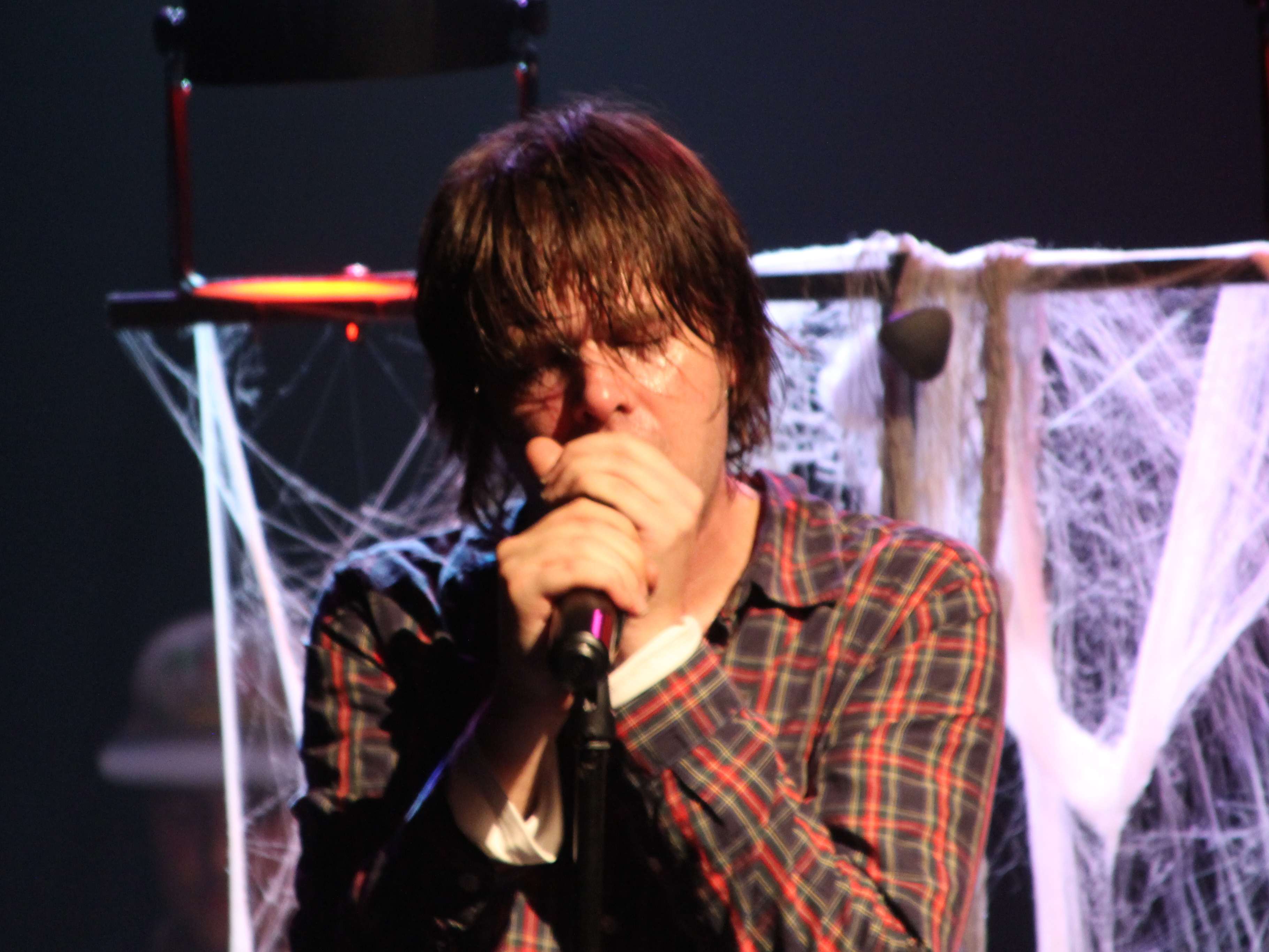 Ariel Pink ::: Bluebird Theater ::: 10.24.17